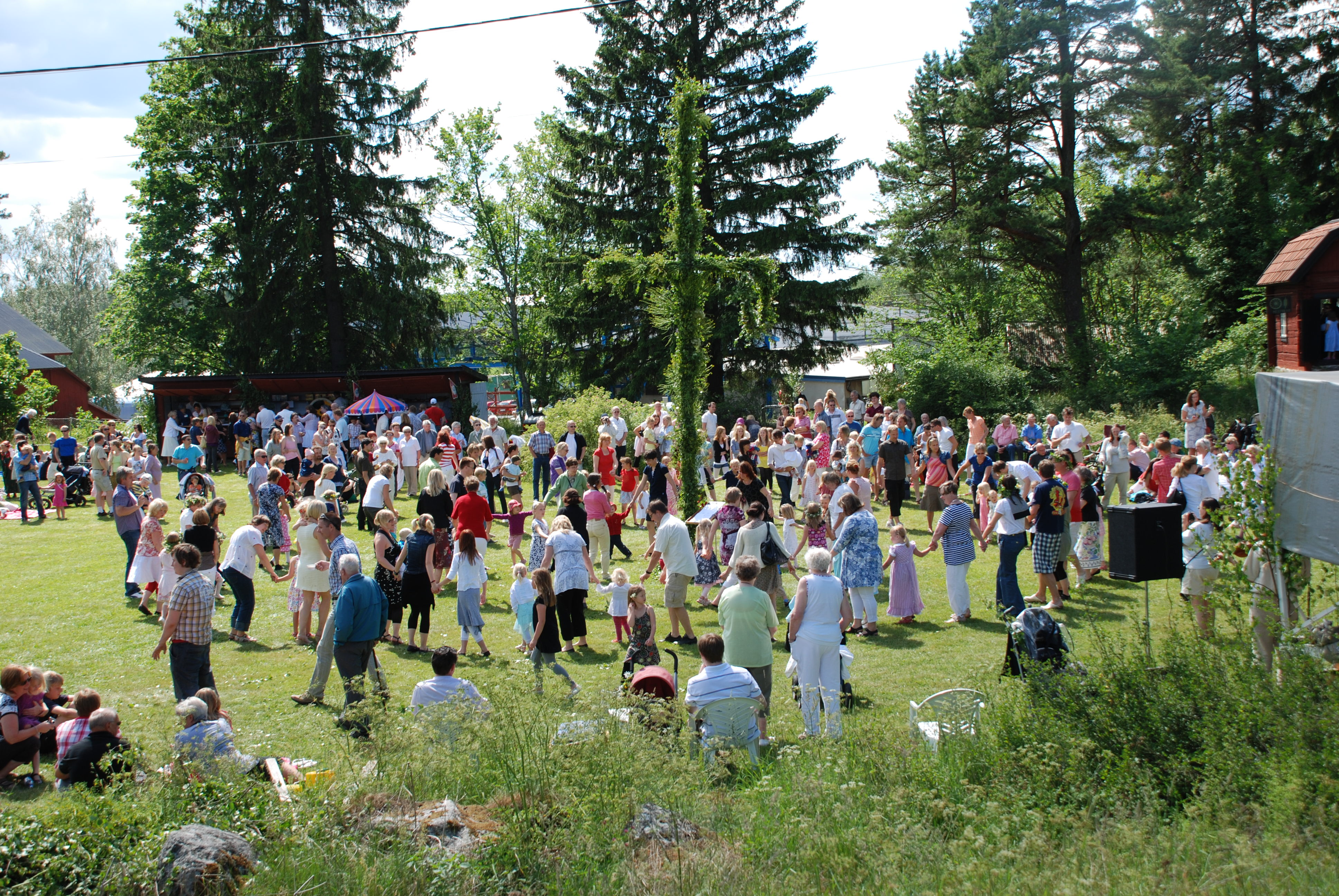 Midsommarfirande på Åsavallen